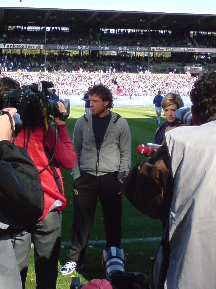 Thomas Doll als Trainer von Borussia Dortmund vor dem Auswärtsspiel beim Karlsruher SC im September 2007